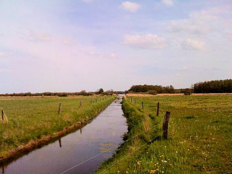 Blick von der Jemnitzschleuse in das Naturschutzgebiet Conventer See.